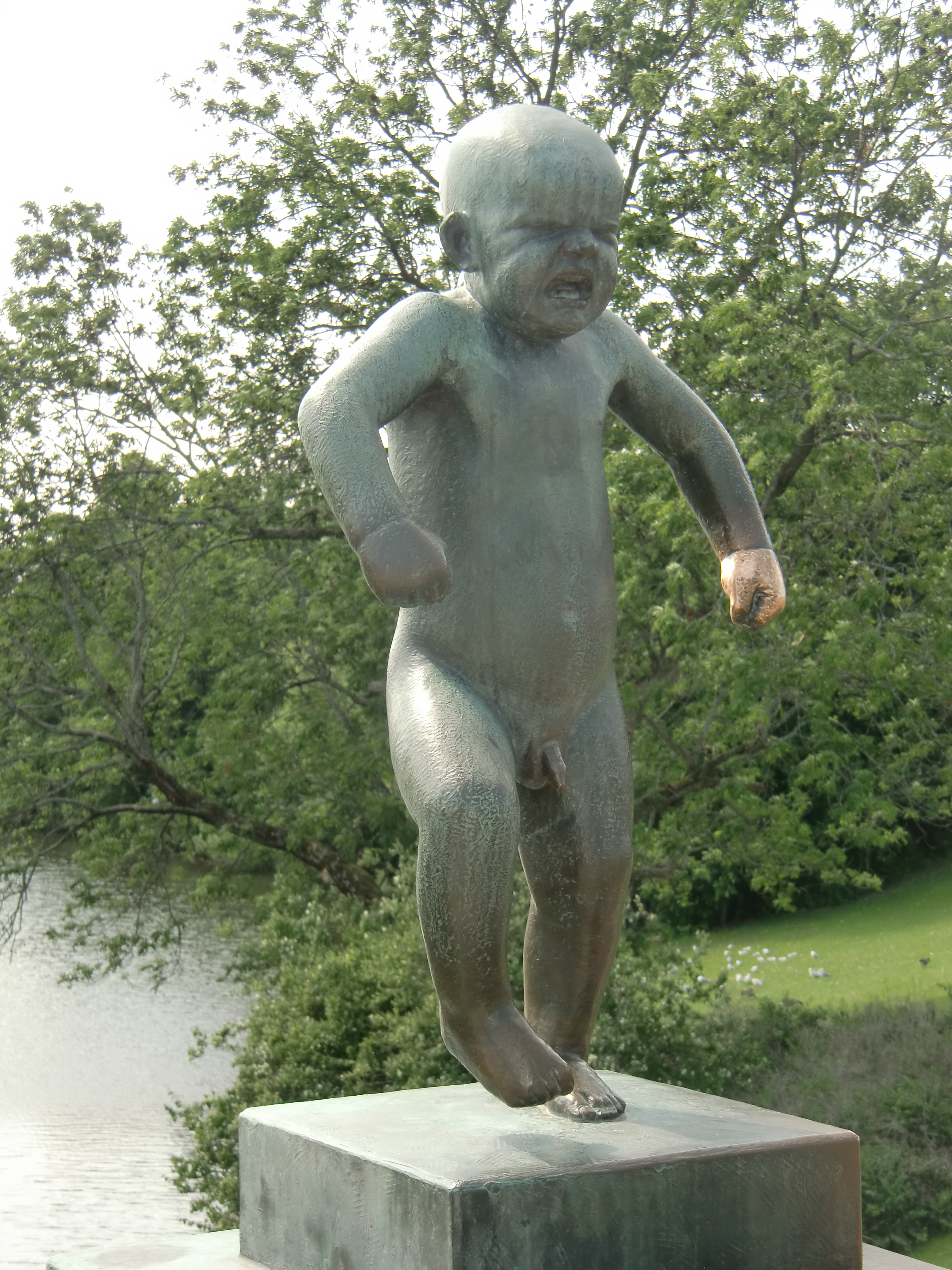 Escultura del parc de Vigeland, d'Oslo